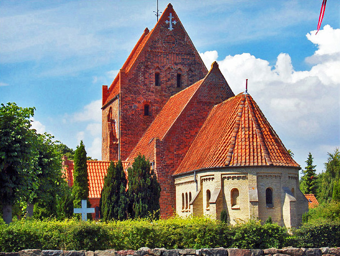 fra sydøst